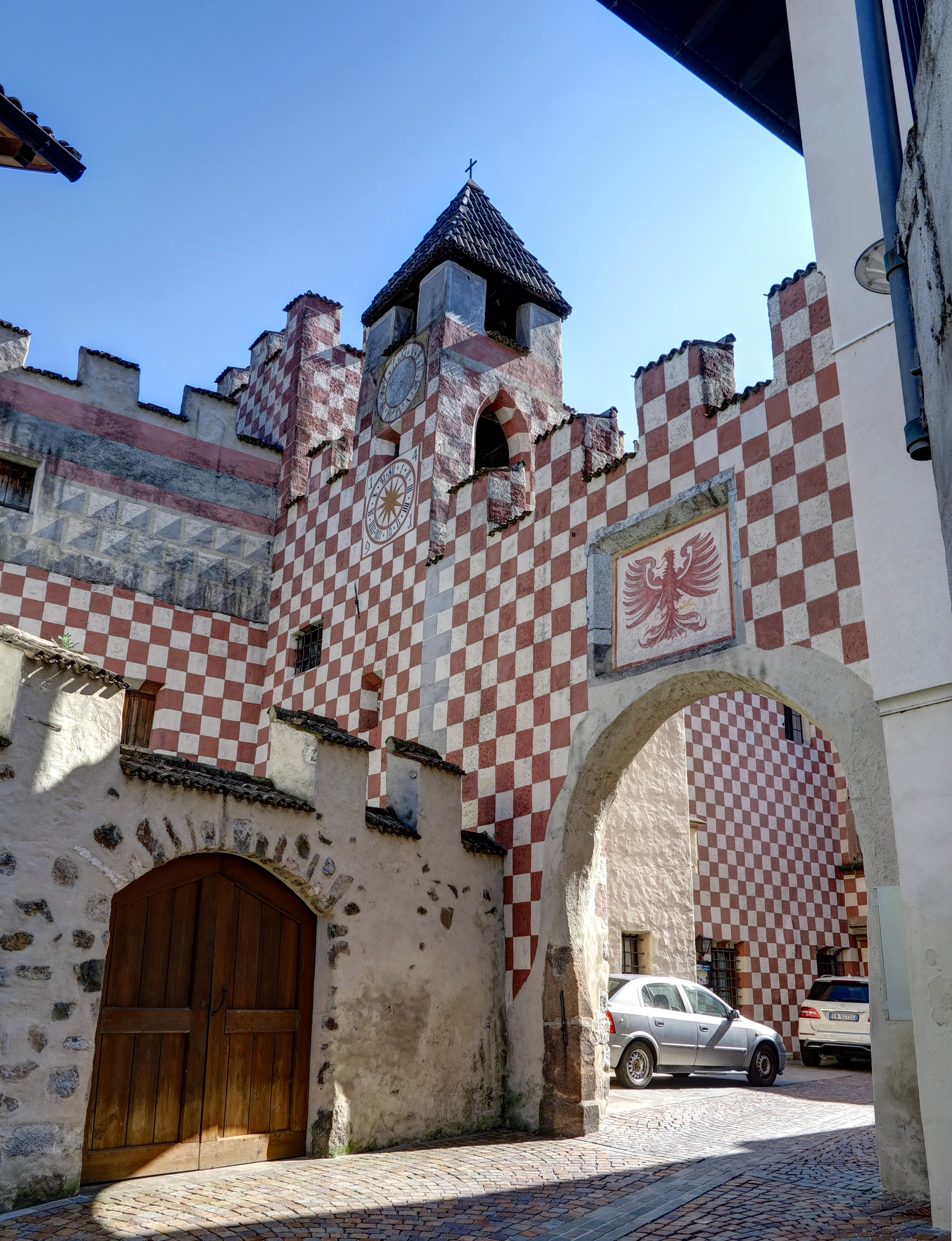 Italien, Südtirol, Barbian, Kollmann, ehemalige Zollgebäude Friedburg